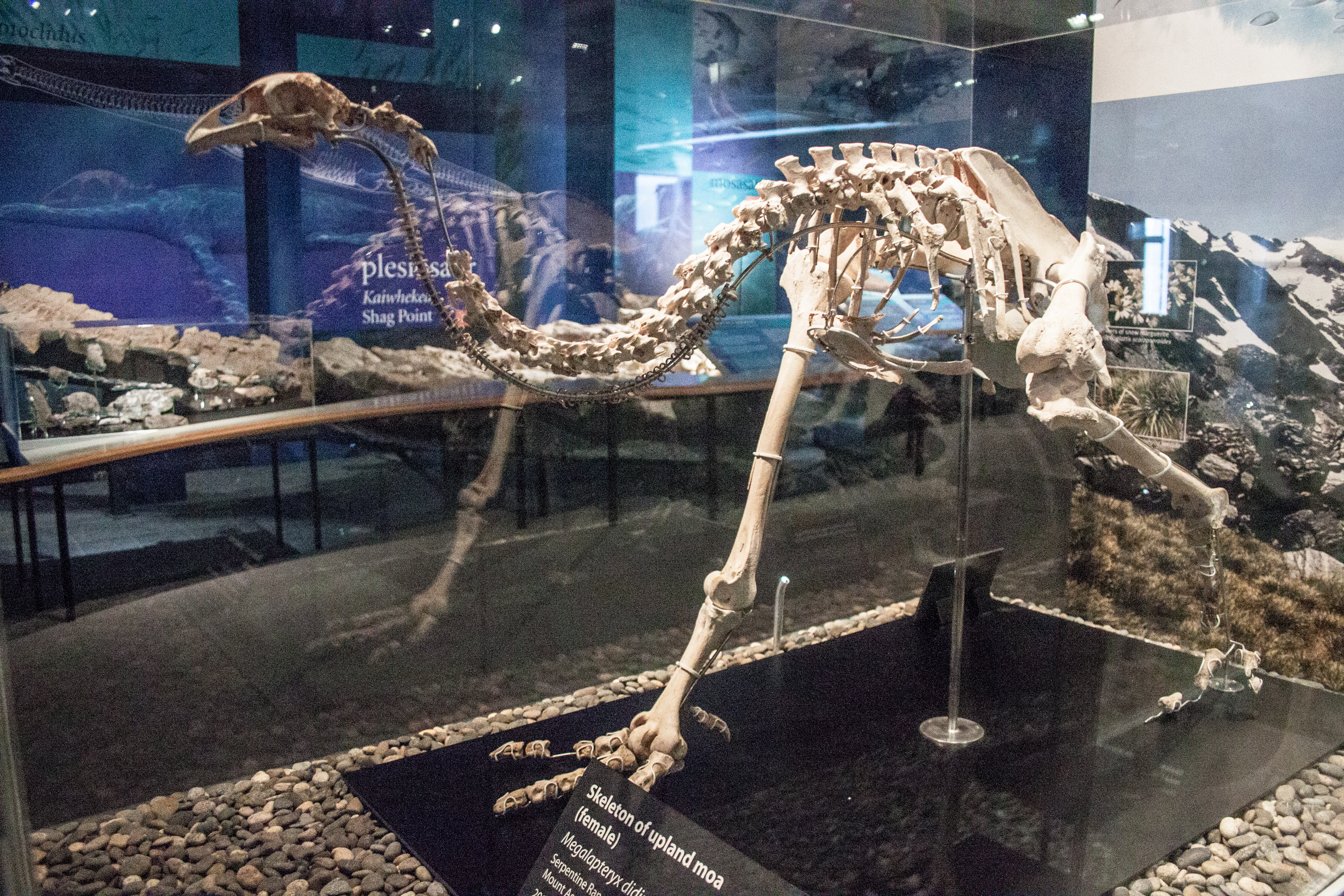 Upland moa skeleton